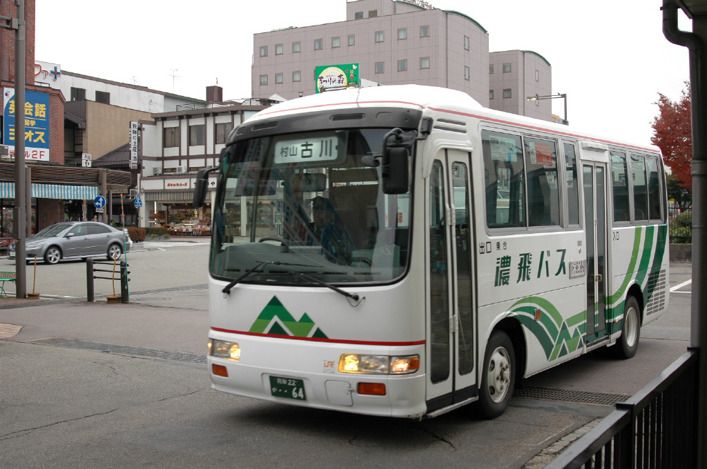 古川行き